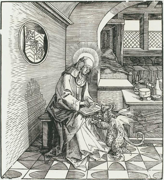 Sainte Madelberte ou Machtelberthe, vierge, abbesse de Maubeuge